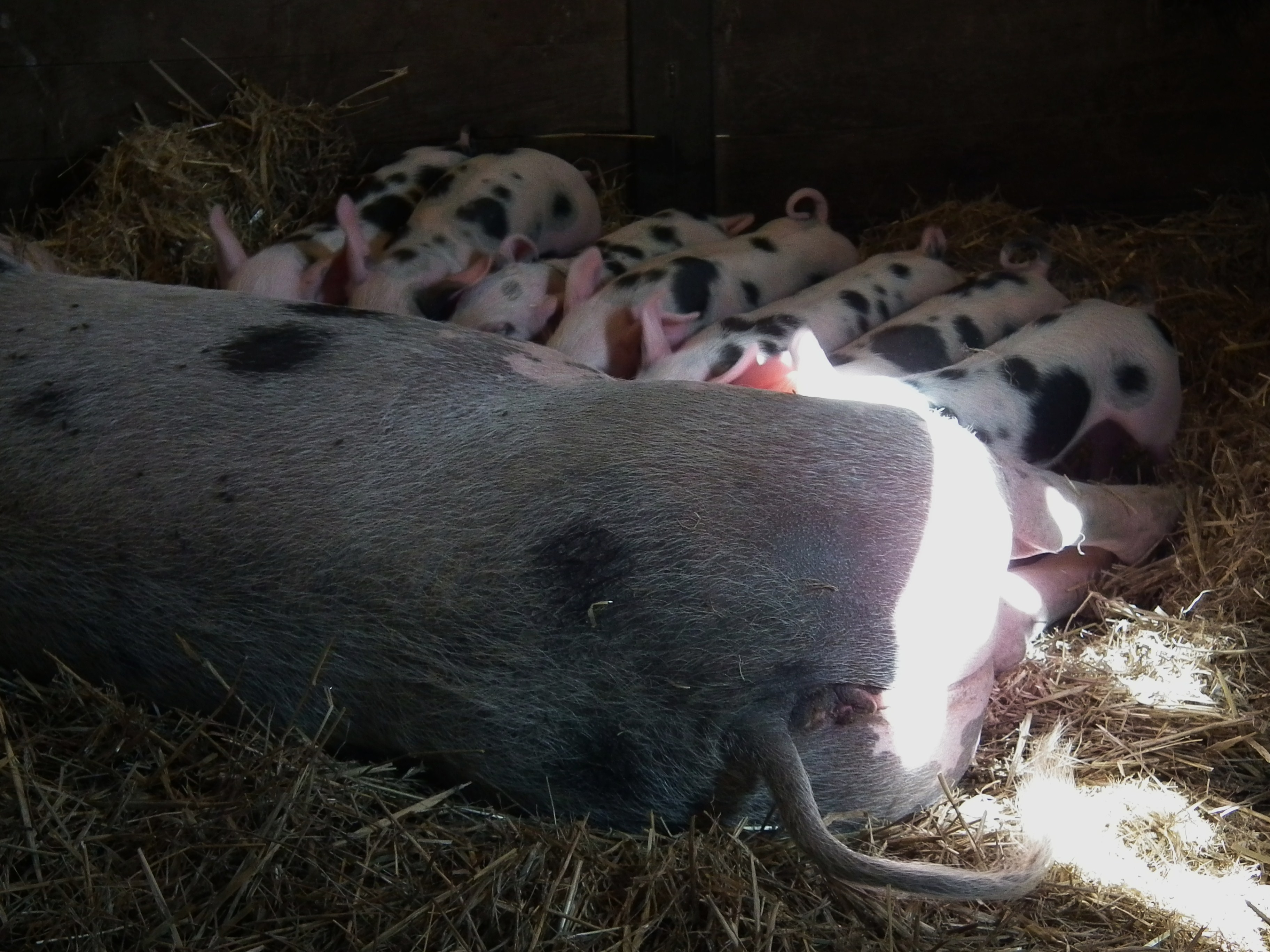 Bentheimer Landschwein im Tiergarten Worms (Rheinland-Pfalz, Deutschland)